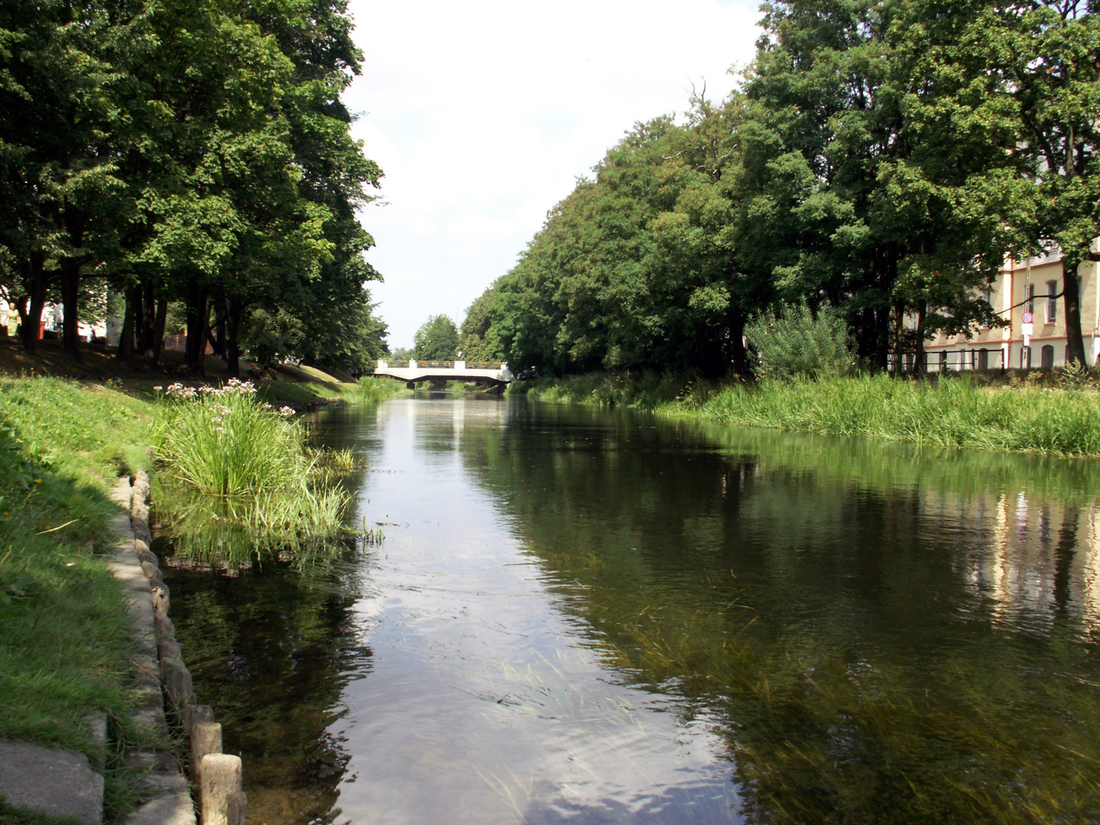 Rzeka Słupia i bulwar nadrzeczny